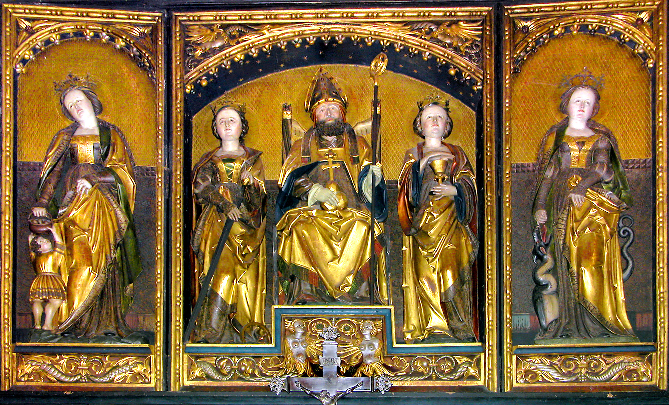 12.09.2011 09627 Oberbobritzsch (Bobritzsch-Hilbersdorf), Kirchstraße (GMP: 50.875369,13.453209): Dorfkirche St. Nicolaus, im Kern mittelalterlich, 1710 erneuert. 3(6)-flügeliger Schnitzaltar (Nikolausaltar) von 1521 von einem unbek. Freiberger Künstler, dem sog. "Bobritzscher Meister". Er zeigt mittig St. Nikolaus umgeben von der Gruppe der vier sogenannten Virgines capitales, der großen heiligen Jungfrauen: Linke Außentafel: hl. Dorothea (Attribut Brot- korb, Früchtekorb); im Mittelschrain: hl. Katherina (Attribute Schwert, Rad und Krone), der thronenden St. Nicolaus und die hl. Barbara (Attribut Turm oder Kelch); rechte Außentafel: hl. Margaretha {Margareta, Margarete} (Attribut Wurm, Lindwurm, Drache). [DSCNn2758.TIF]201109122320DR.JPG(c)Blobelt